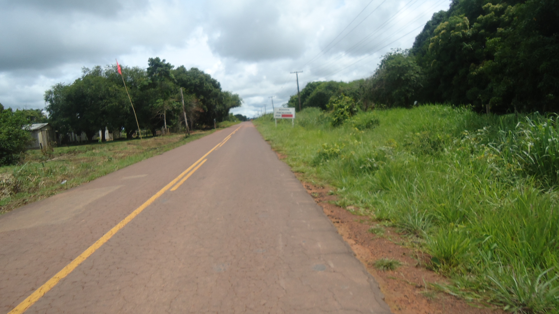 ac-010